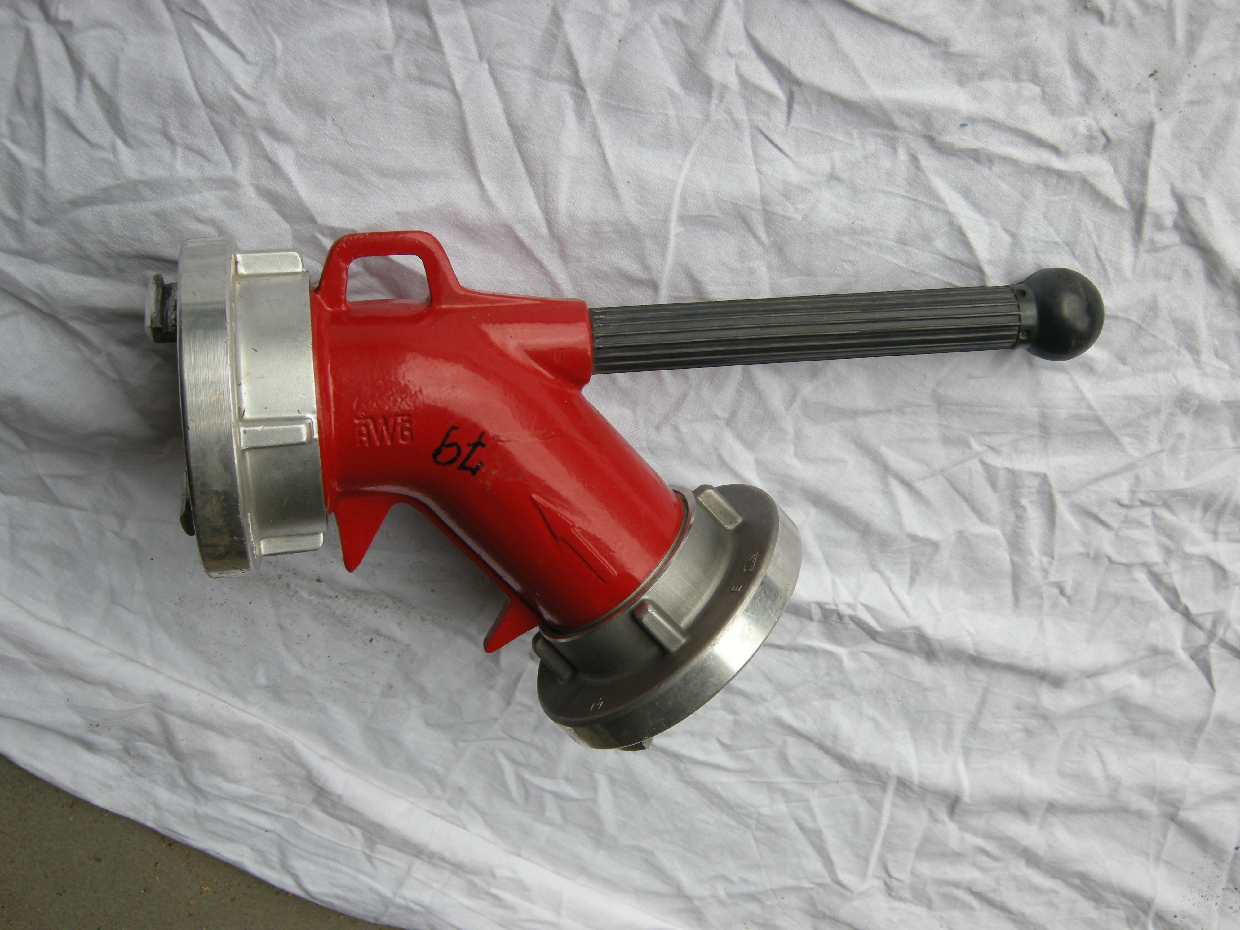 Stützkrümmer der Freiwilligen Feuerwehr Mönchhagen